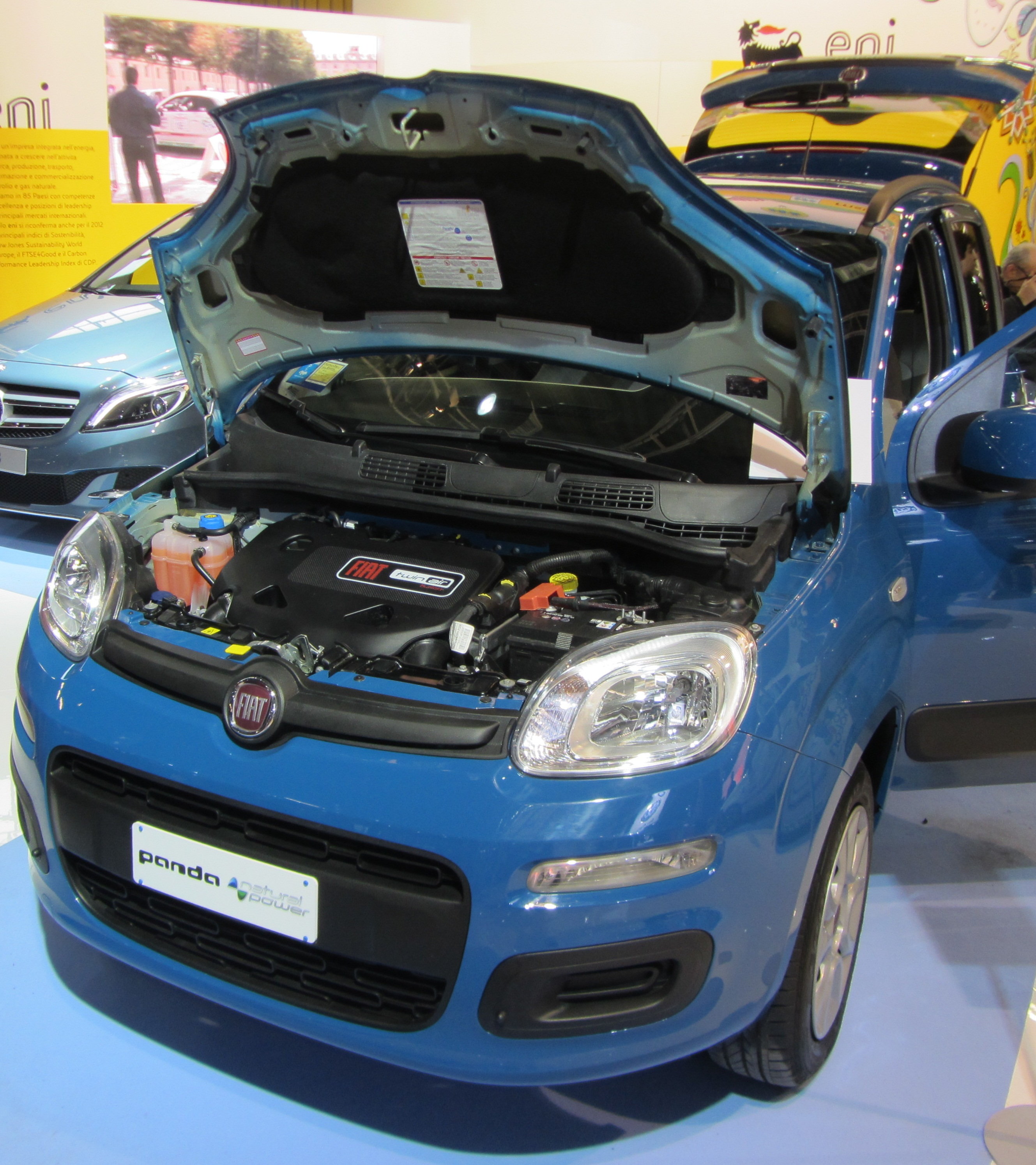 Panda 2011 Natural Power al motorshow di Bologna